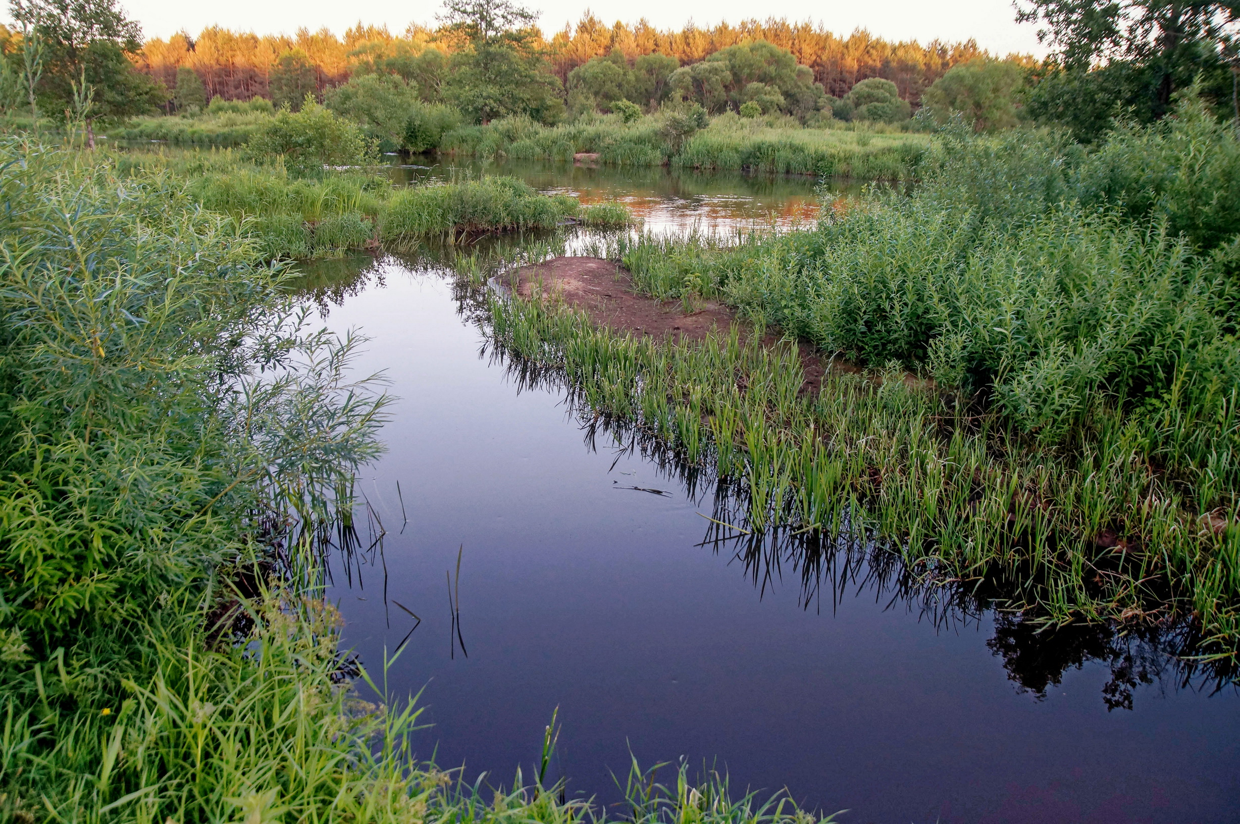 Вусце Спорні